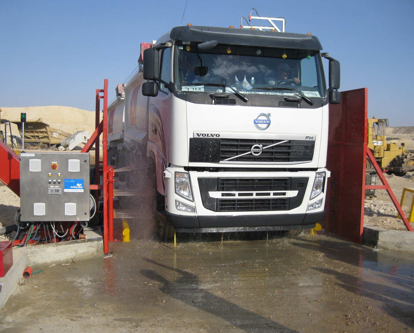 Grobschmutzwaschanlage